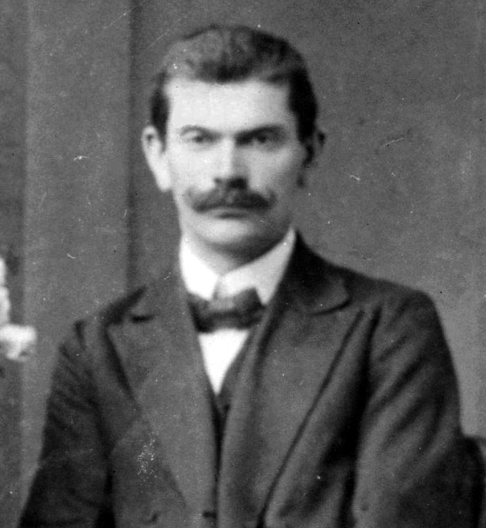 Spisovatel prof. Miloš Seifert